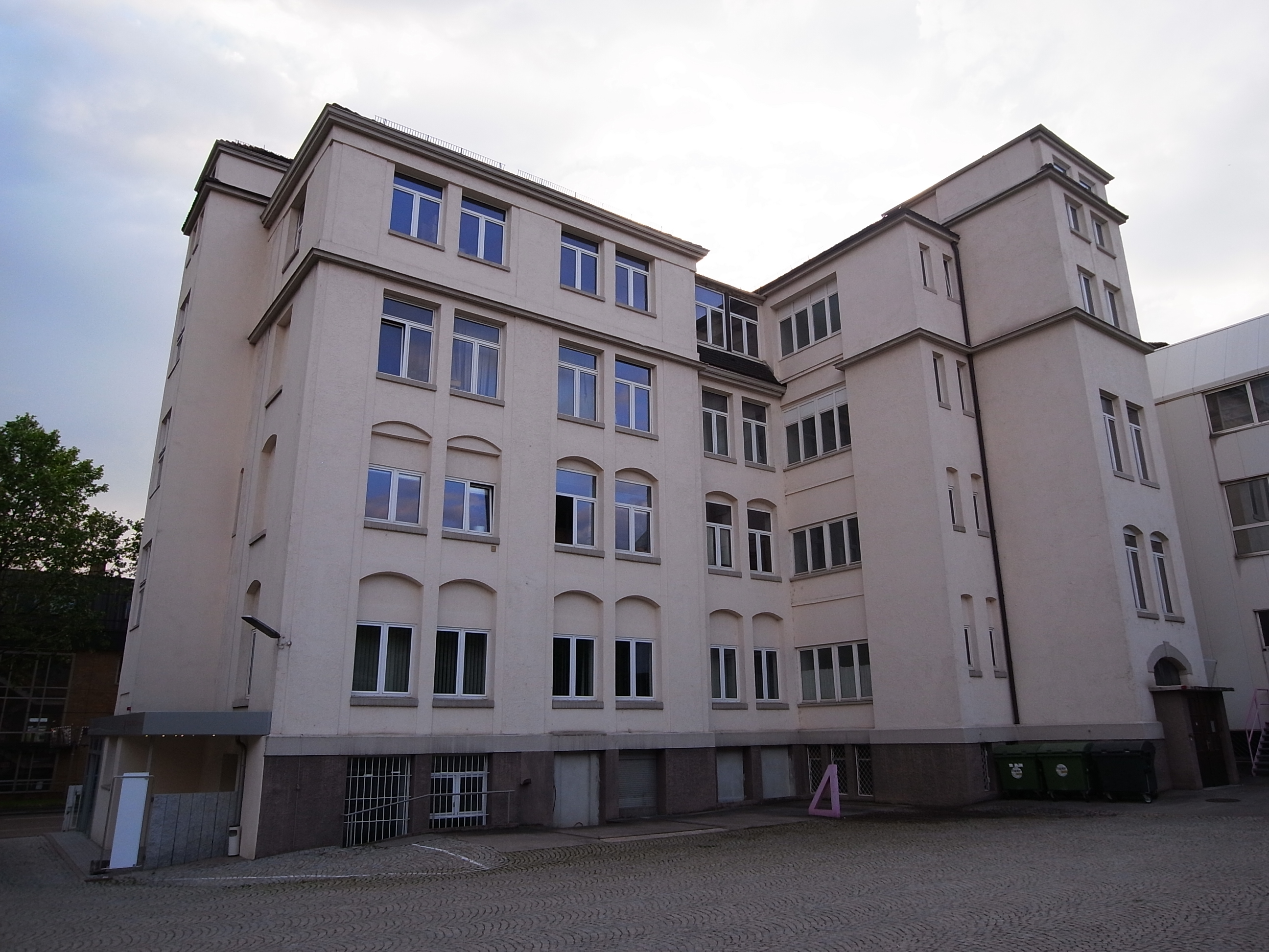 Die ehemaligen Eszet-Werke (Hinterhofansicht)